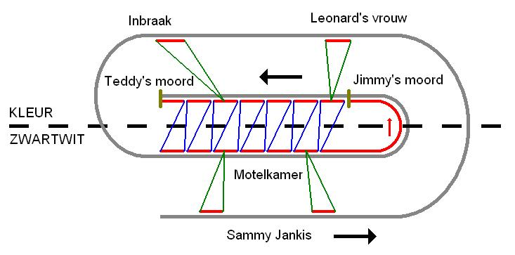 structuur van de plot van Memento